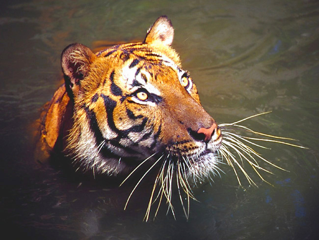 Panthera tigris jacksoni, Malaysian national animal.